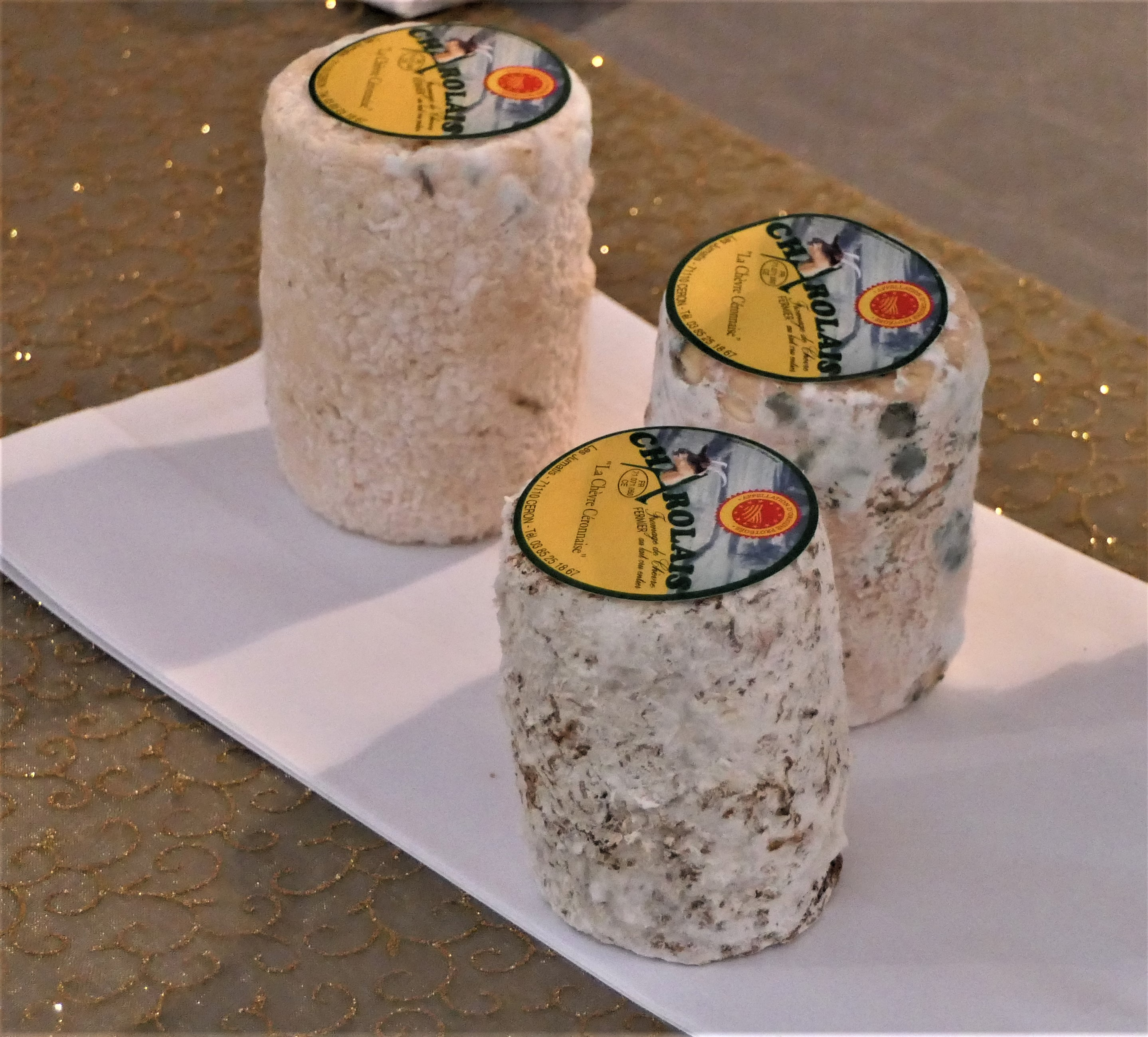 Fromage charolais